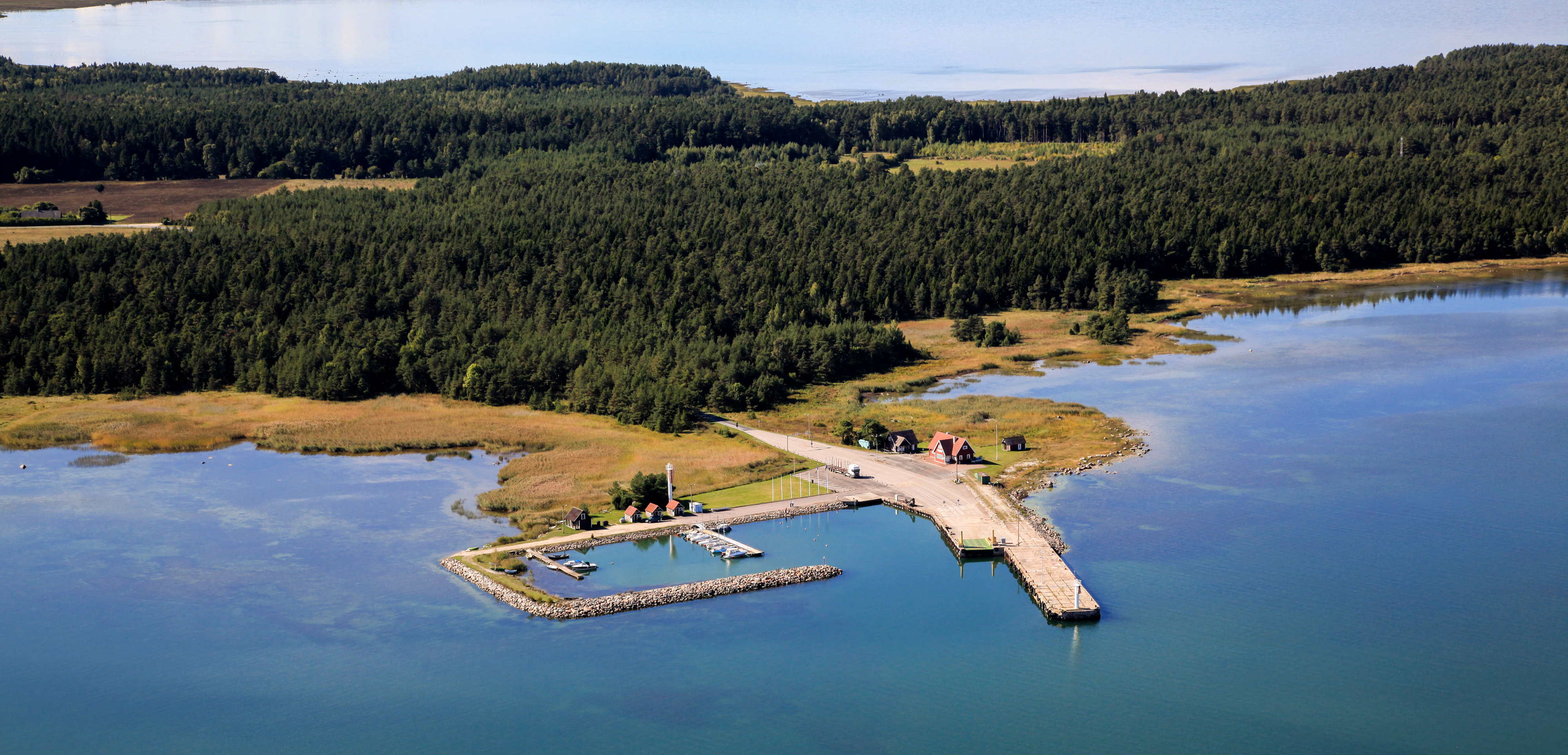 Triigi sadam